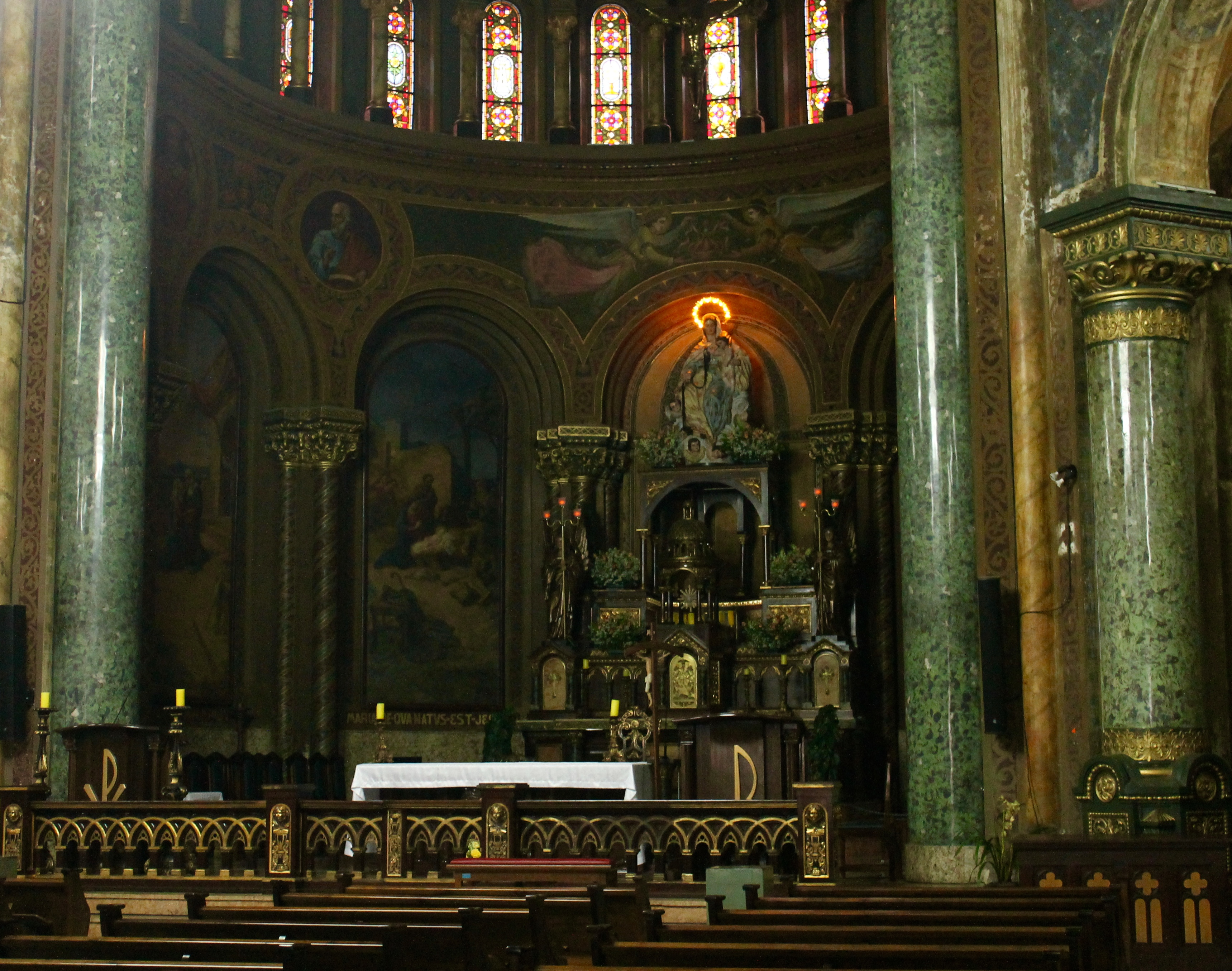 altar-mor da igreja, decoração, vitrais e colunas